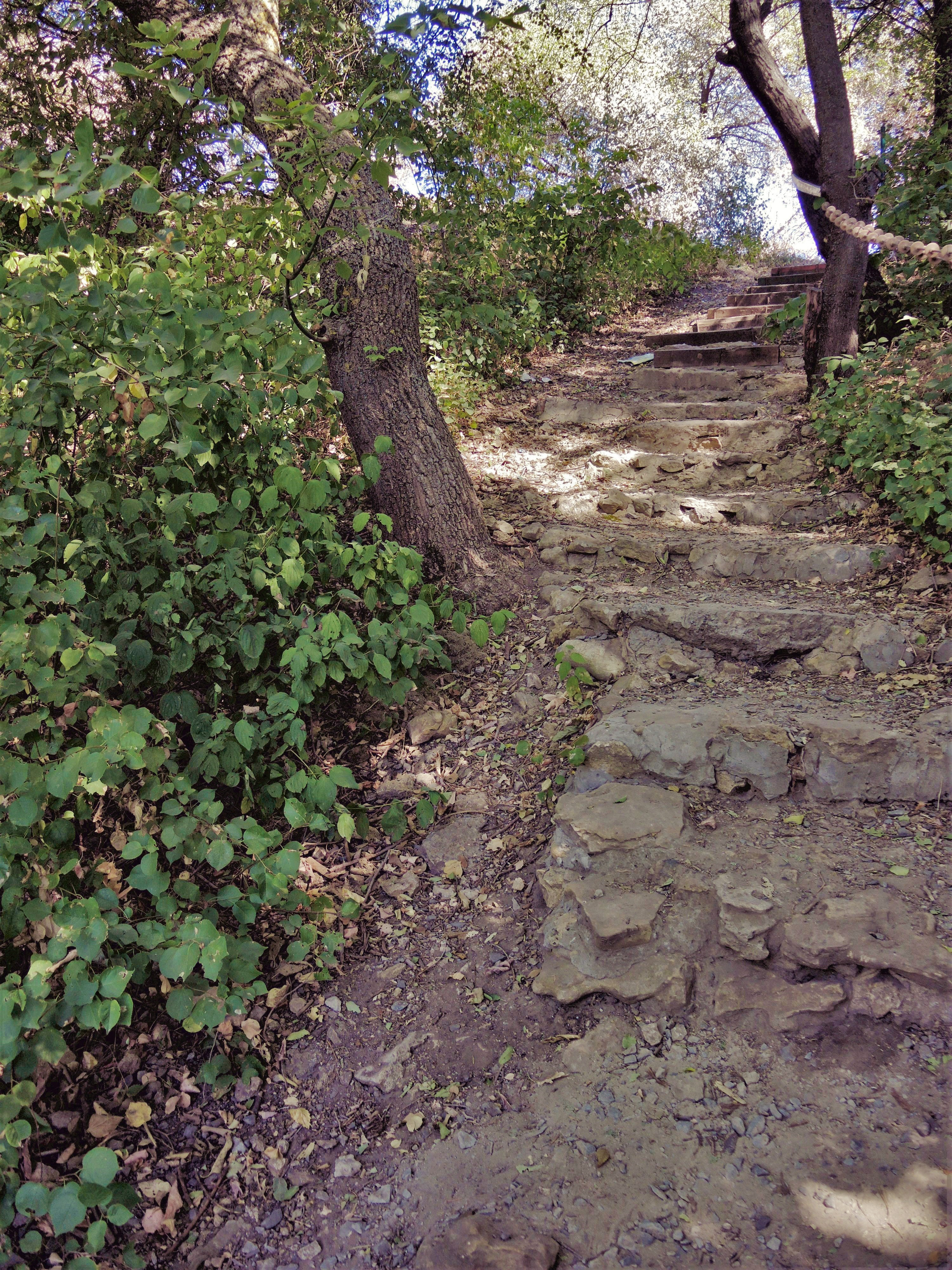 Ливенцовская курганная группа (23 насыпи). Ливенцовский комплекс: между пос. Ливенцовка и Каратаево, вторая надпойменная терраса р. Мертвый Донец, вдоль ж.д. Ростов-Таганрог, сев.и юж.ж/д, Ростов-на-Дону, Ростовская область